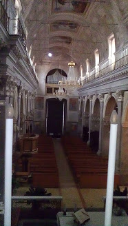 Interno